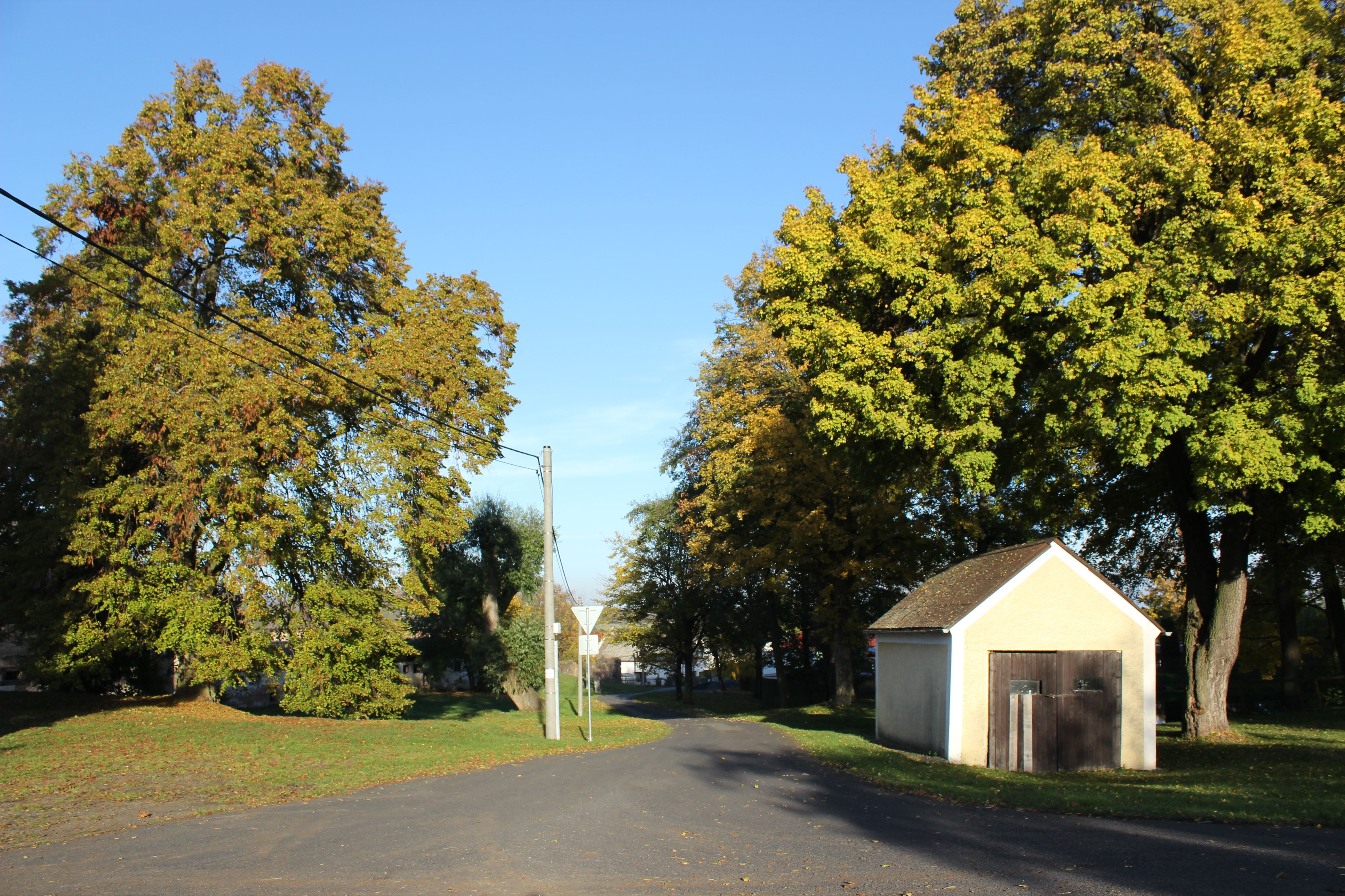 Postranní ulice ve Verušičkách.